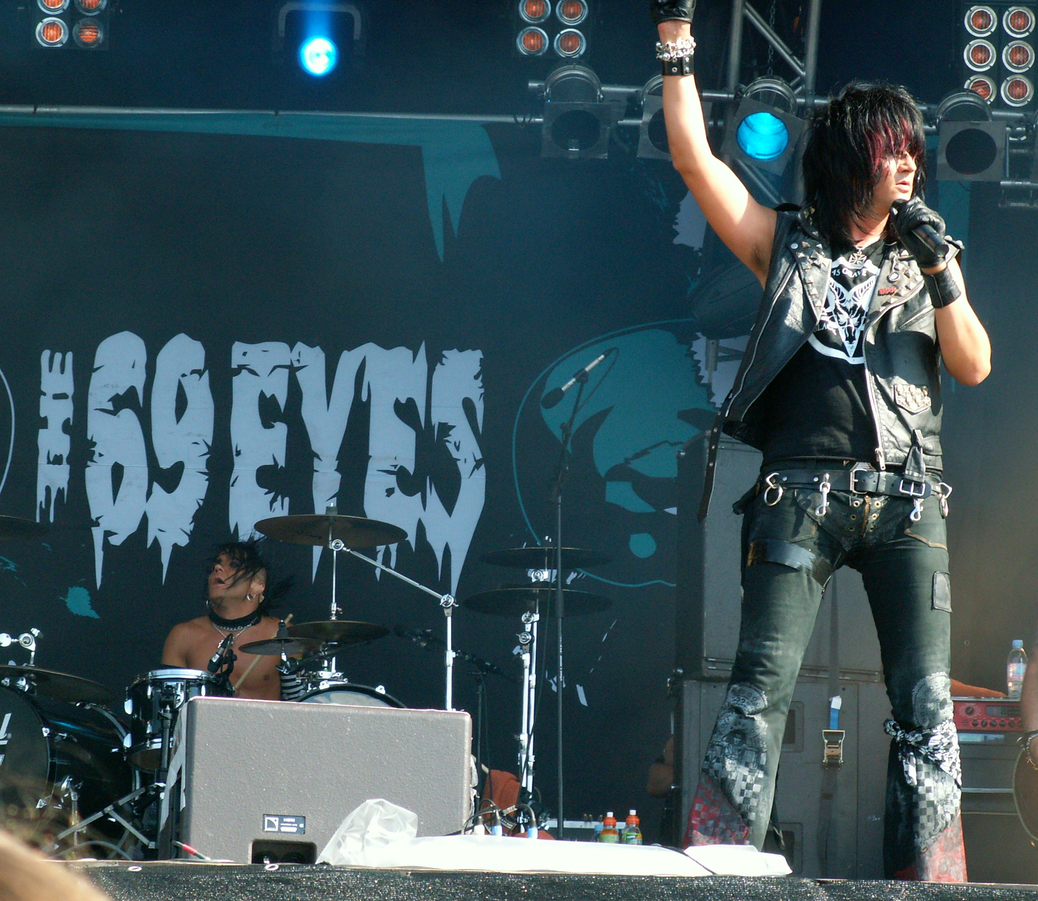 Die Musiker Jussi 69 (Schlagzeug) und Jyrki 69 (Gesang) von der finnischen Dark-Rock-Band The 69 Eyes, beim M’era Luna Festival 2007 in Hildesheim, Deutschland.